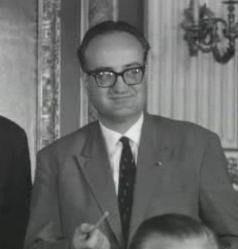 Pieter Bogaers in 1963